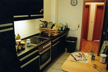 Abgewaschenes Geschirr